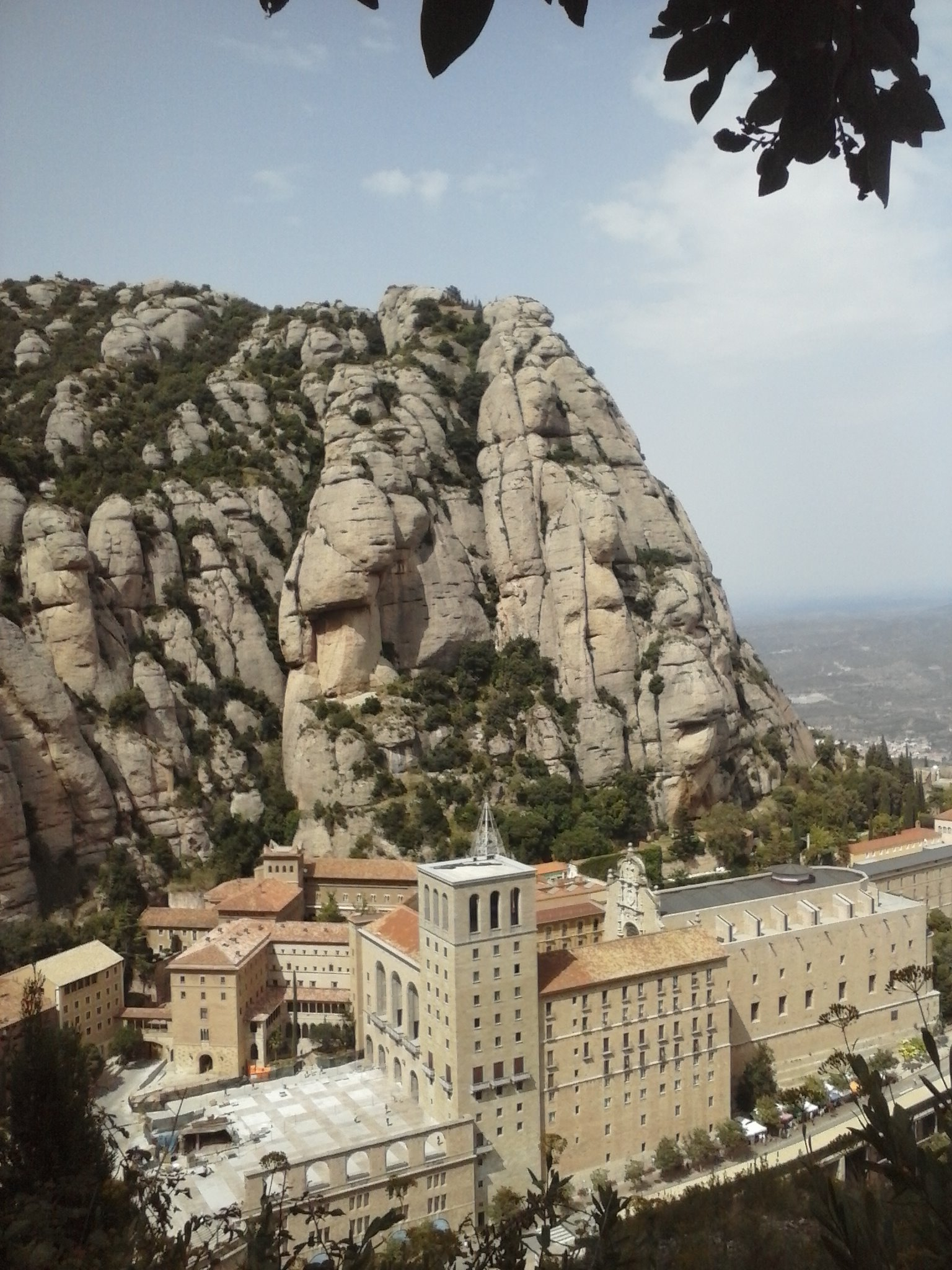 Montaña de Montserrat, Montserrat,Barcelona